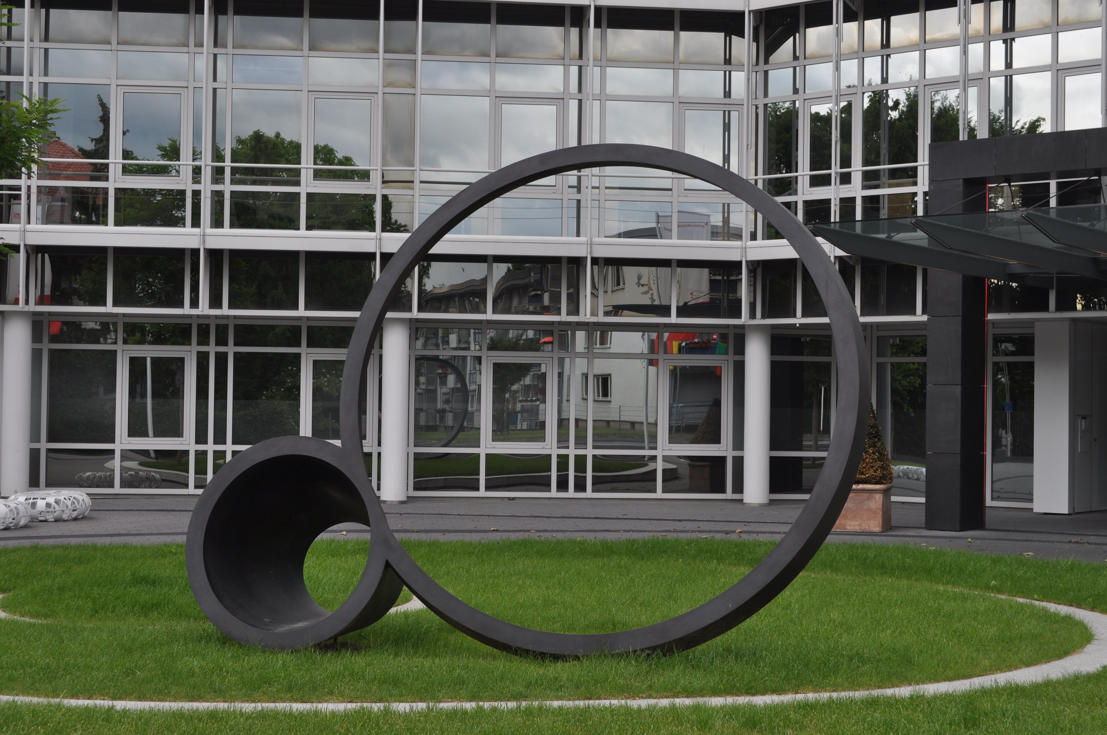 Skulptur Bigger Bite von Nigel Hall aus dem Jahr 2010. Das Kunstwerk wurde auf der Blickachsen 8-Ausstellung gezeigt und steht heute vor dem Eingang der Deutsche Leasing in Bad Homburg.